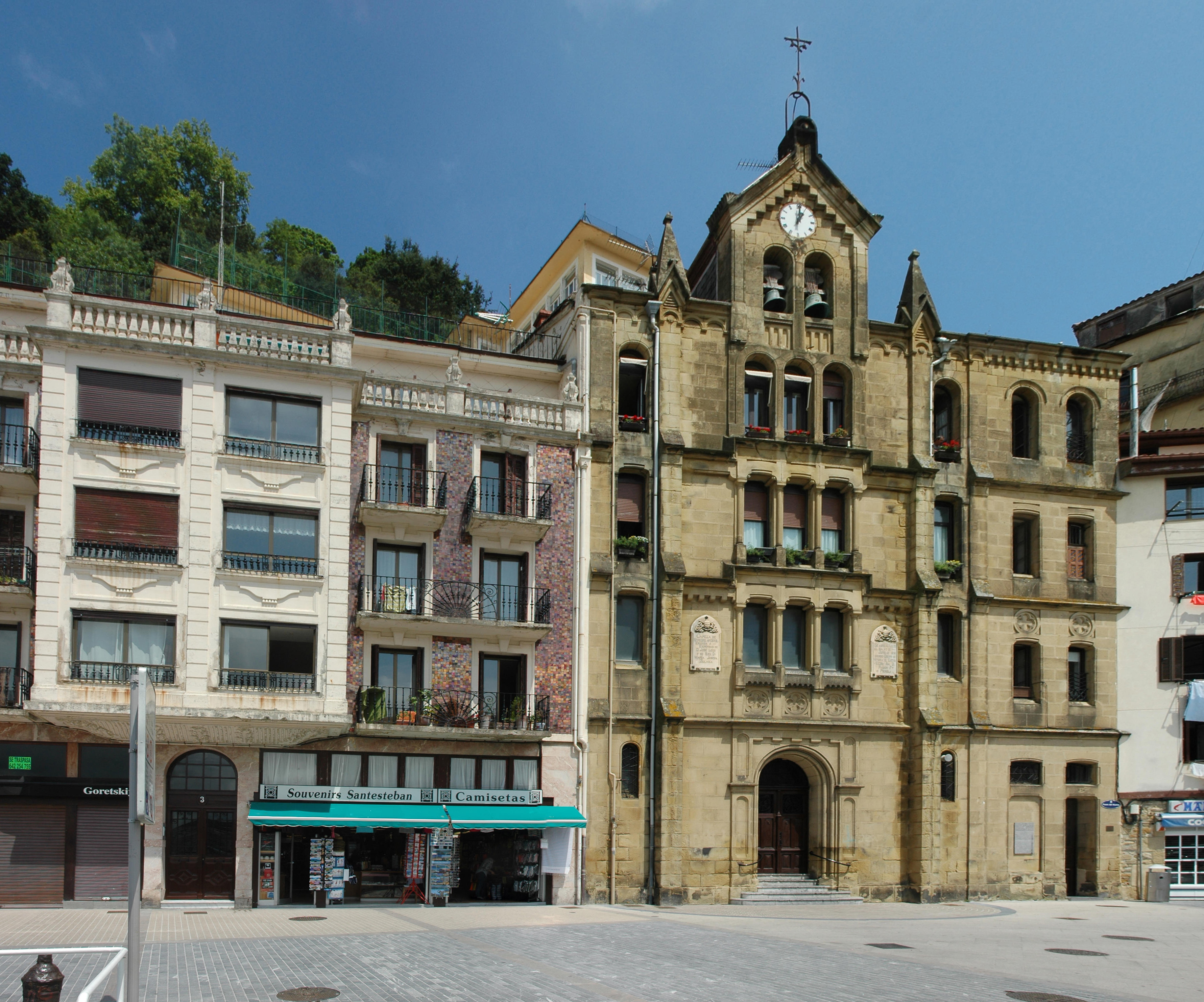 Del Muelle Ibilbidea